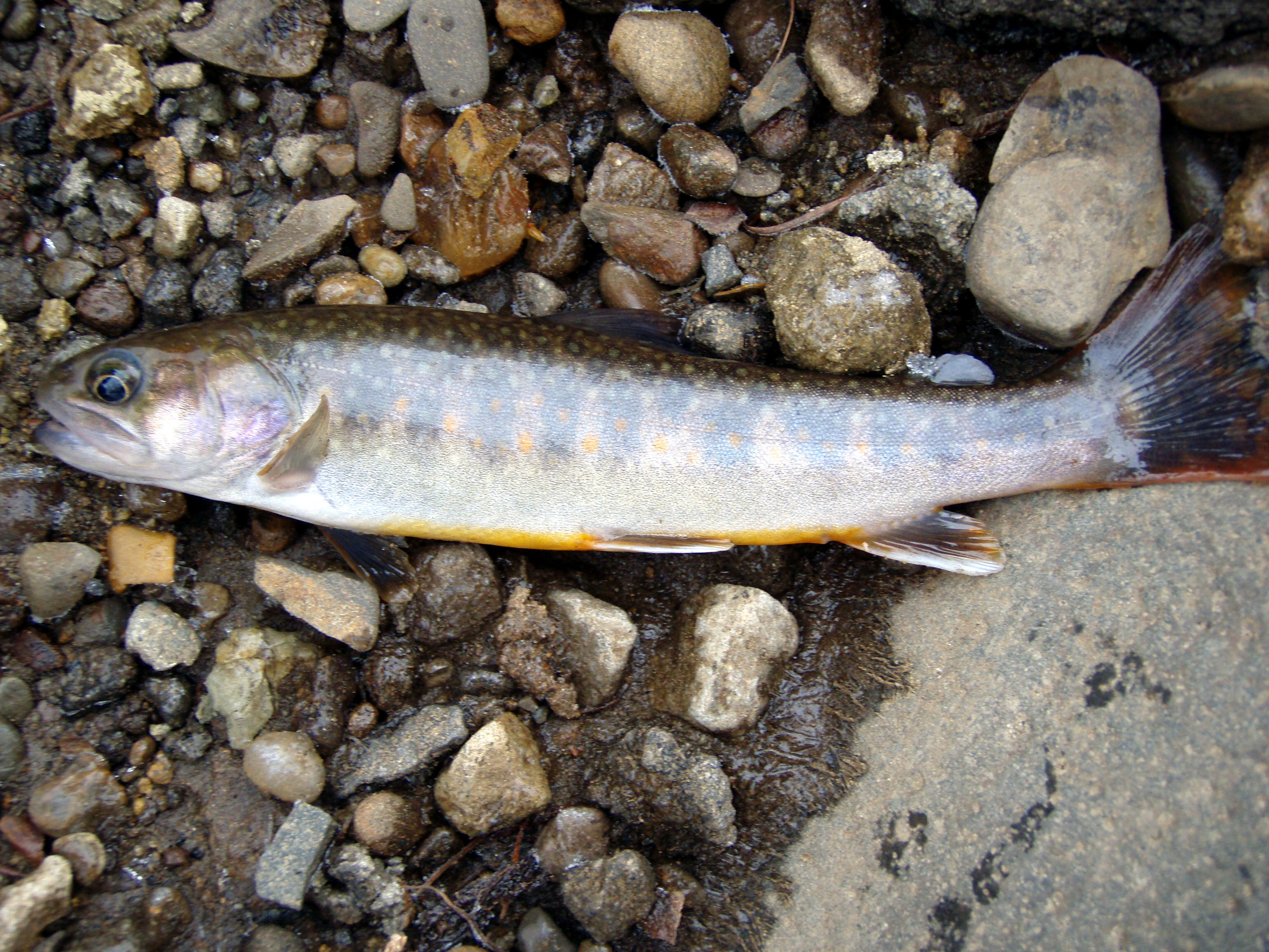 Salvelinus leucomaenis japonicus.